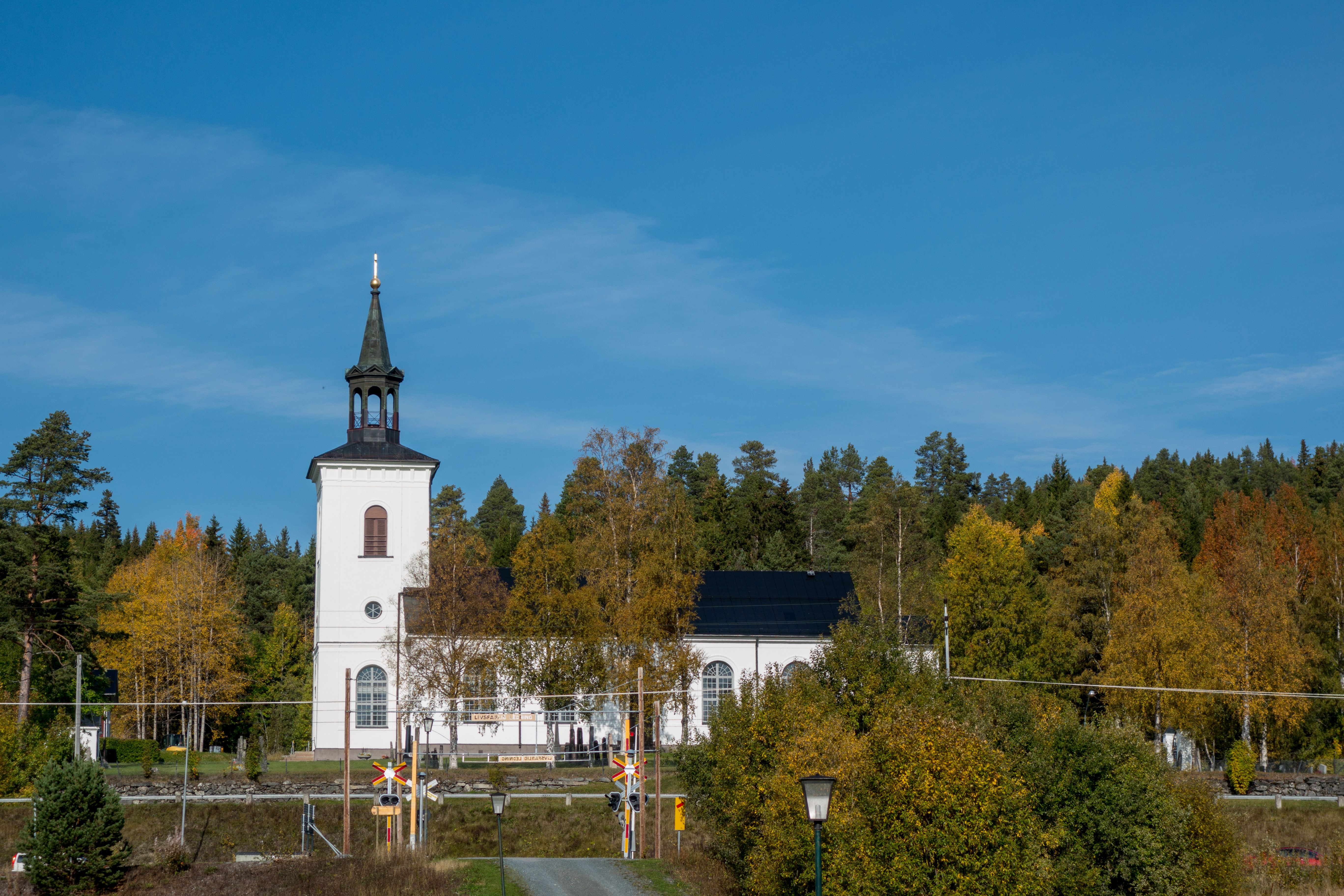 Mörsils kyrka (Mörsils-Bye 3:4)